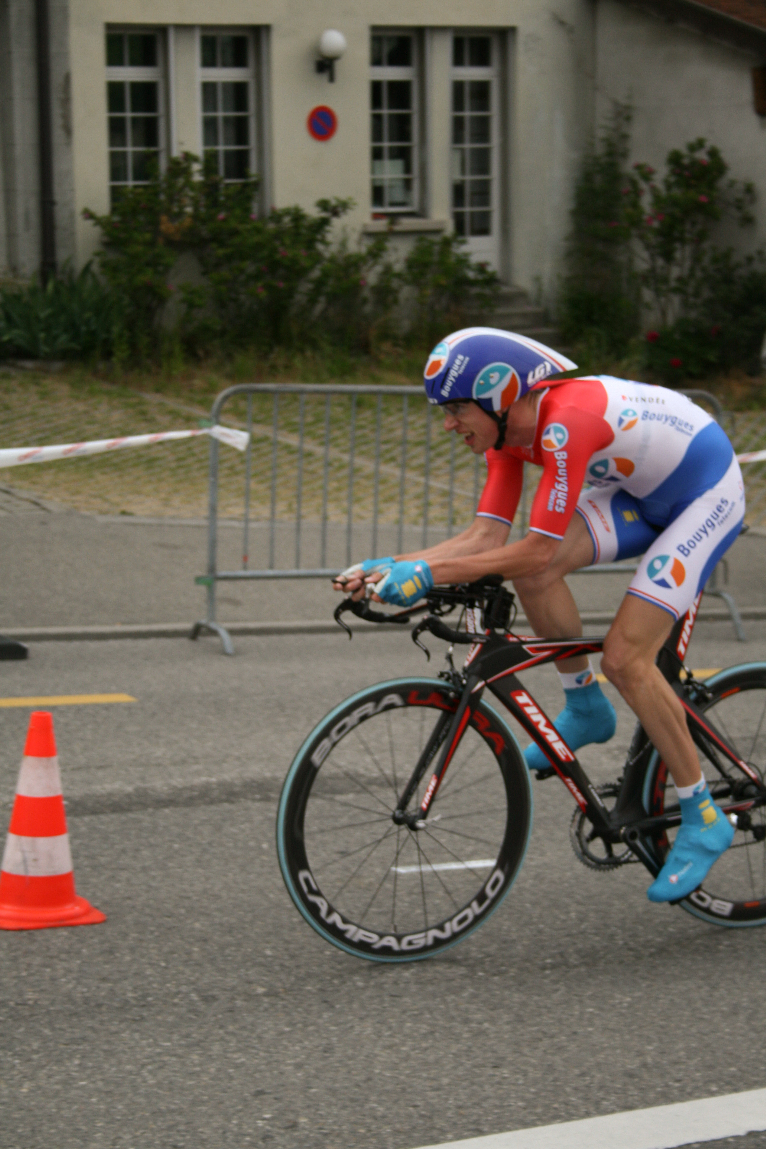 Stef Clement prologue du Tour de Romandie 2007